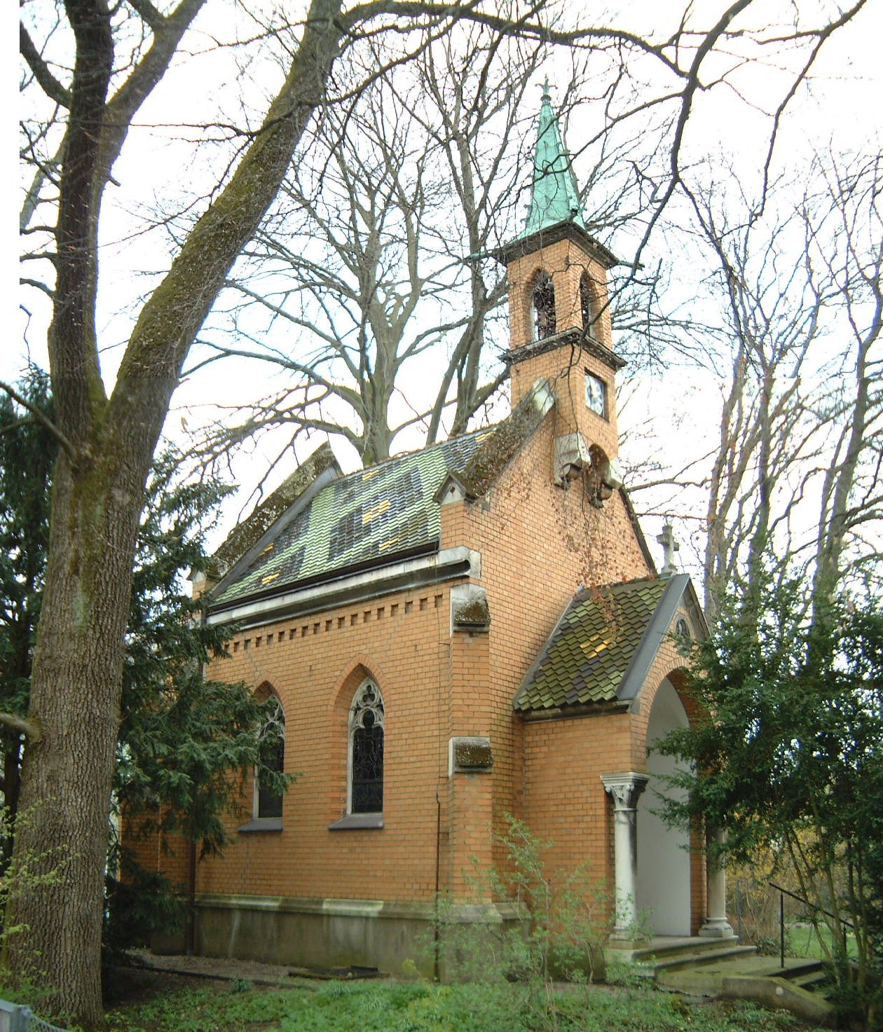 Marienkapelle bei einer Villa Kempten